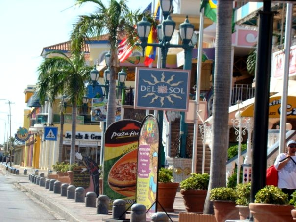 Oranjestad - Aruba (2009)